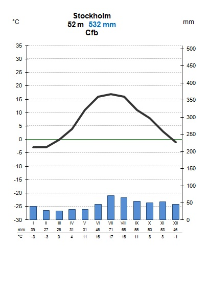 Stockholmi kliimadiagraam